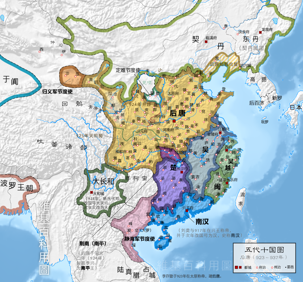 后唐